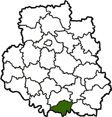 Pischanskyi-Raion map